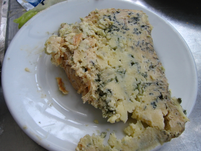 Porción de queso de Cabrales